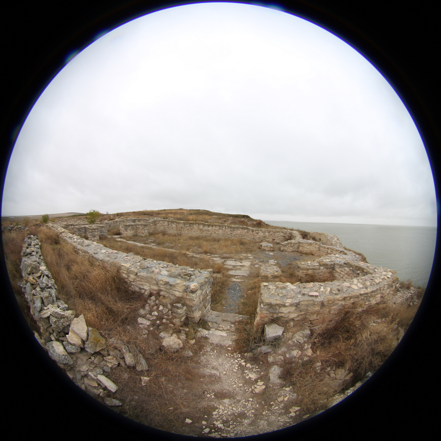 Cetatea Orgame- Argamum - vedere spre lacul Razim 02